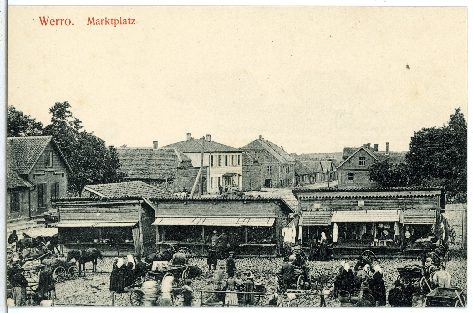 Werro; Marktplatz This postcard is from publisher Brück & Sohn in Meißen ( postcard has a unique number 07730 and is available in a higher resolution at the publisher. This images was uploaded in a cooperation project between Wikipedians and the publisher.